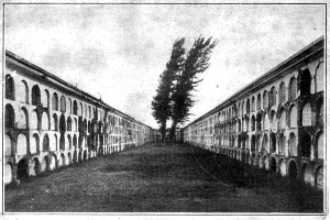 El antiguo Cenmenterio de Espada